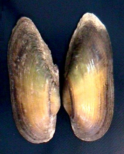 Tamsiella tamsiana de Hato Piñero estado Cojedes - Venezuela